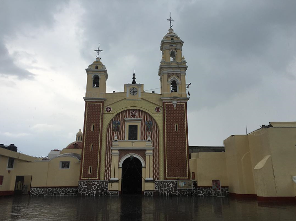 Parroquia de San Pablo Apostol, San Pablo del Monte. (iwonderwoman)